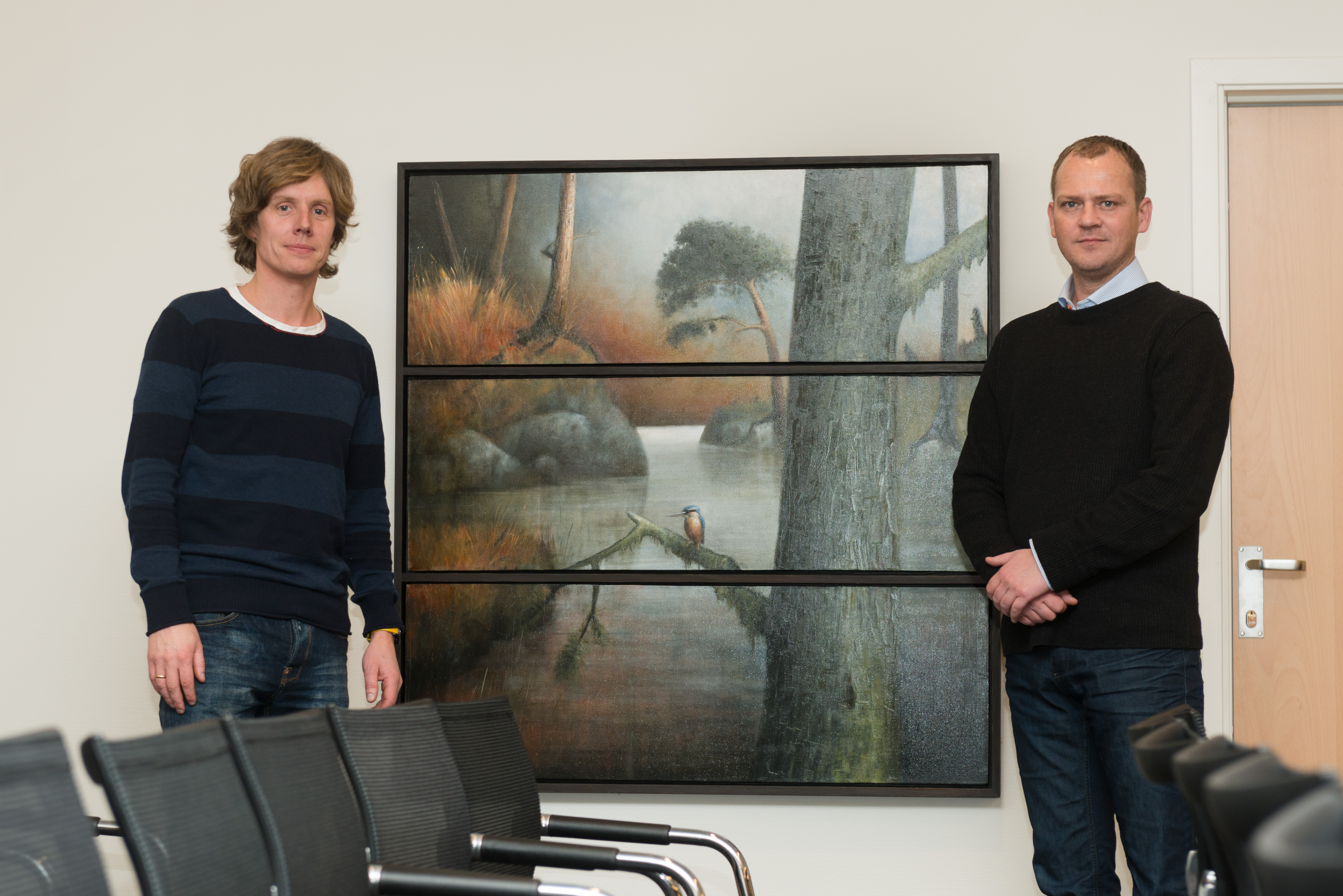 Stian Heimlund Skjæveland (t.v.) og ordfører i Strand kommune Helge Steinsvåg, etter Strand kommunes innkjøp av Heimlund Skjævelands maleri til utsmykning i kommunestyresalen.